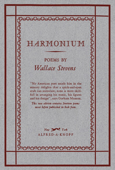 Обложка первого издания сборника стихов Harmonium Уоллеса Стивенса